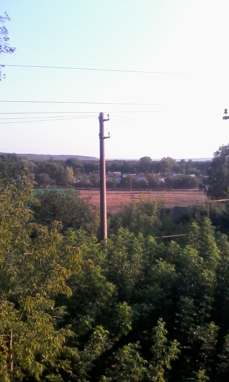 Санаторная — остановочный пункт Чишминского направления Башкирского отделения Куйбышевской железной дороги в Уфимском районе Башкортостана.